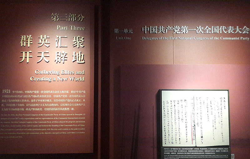 la réunion des élites, le nouveau monde arrive